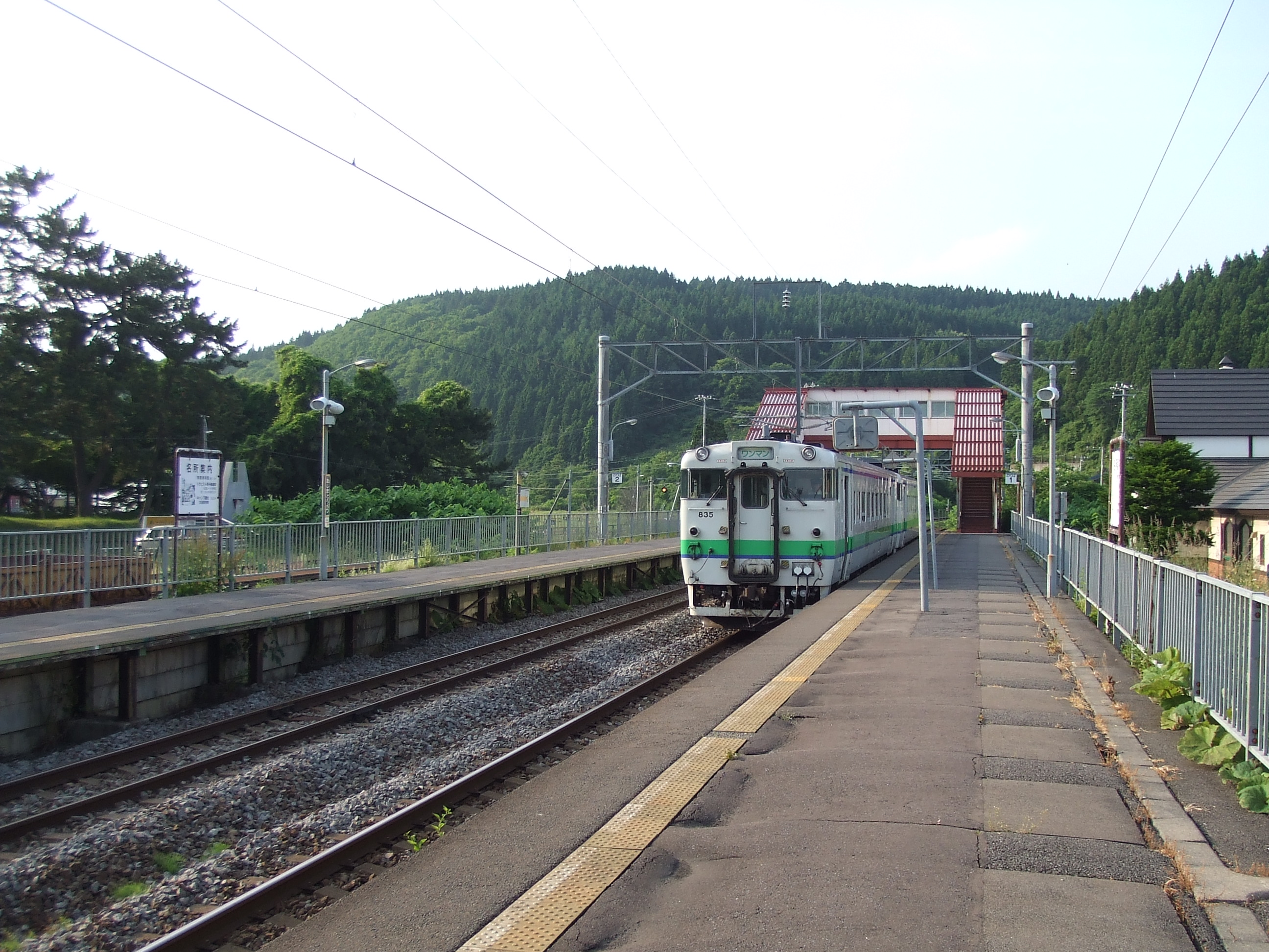 渡島当別駅 駅構内の様子